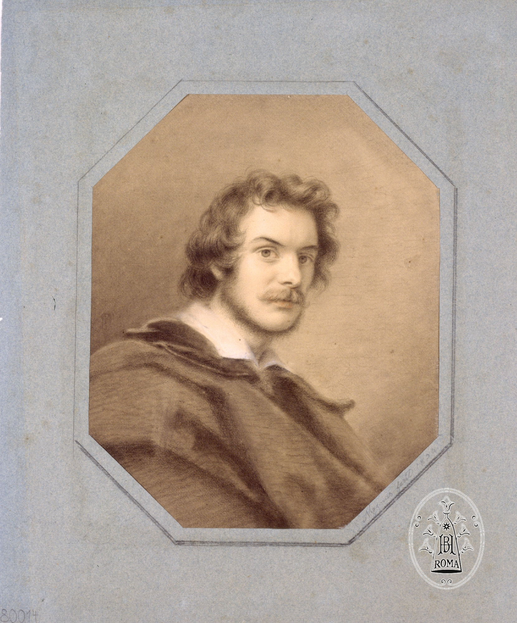 Porträt Ludwig Schwanthaler, gezeichnet von Eduard Magnus, Rom 1834